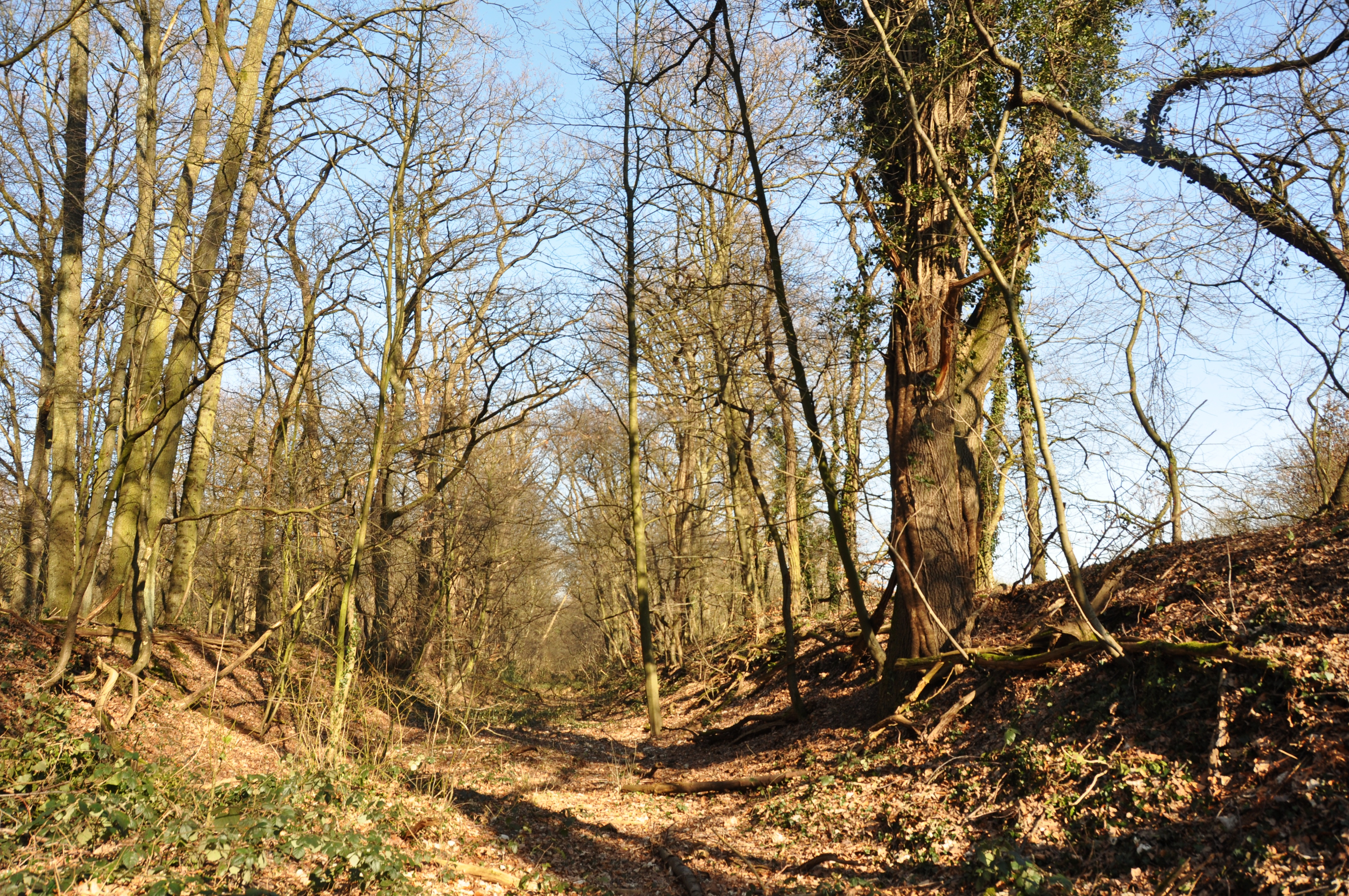 Überwachsene Erdwälle links und recht mit Schießbahn dazwischen